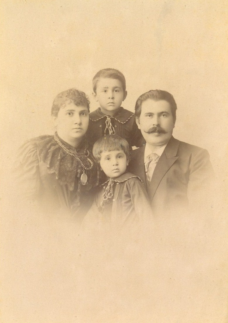 Семья Кечекьян. Фотография Федора Сепановича, Искуги Христофоровны и старших детей. Нахичеван на-Дону, 1893 г.